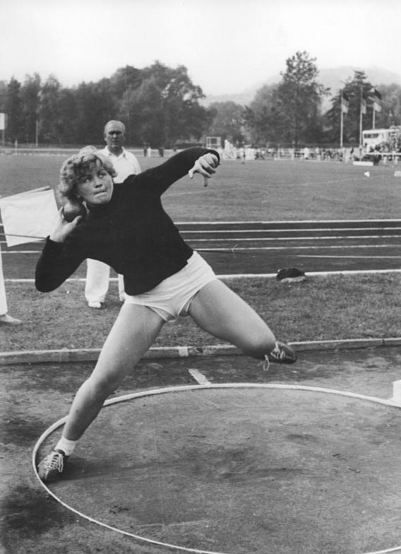 Wilfriede Tews Zentralbild TED-Wehse 14.9.1955 - 3165- VI. Leichtathletik-Meisterschaften der Deutschen Demokratischen Republik vom 2. - 5.9.1955 in Jena UBz: Wilfriede Tews, DHfK Leipzig, wurde mit 14.09 m DDR-Meister im Kugelstoßen.